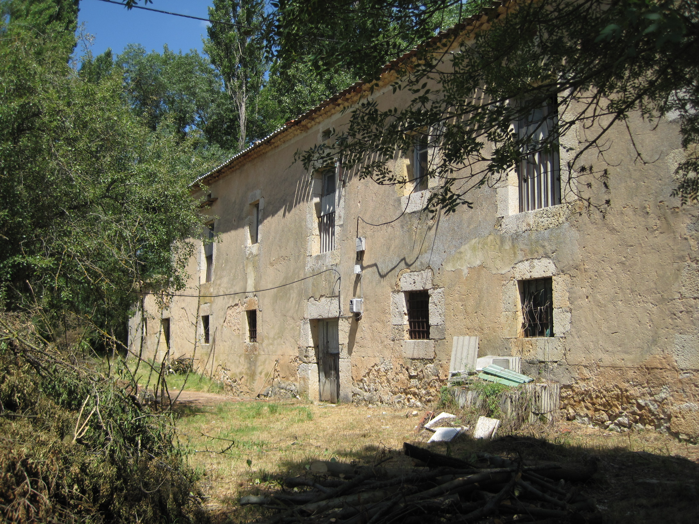 Vista parcial del Molino del Hoyo en 2010, en Quintanarraya (Burgos, España).